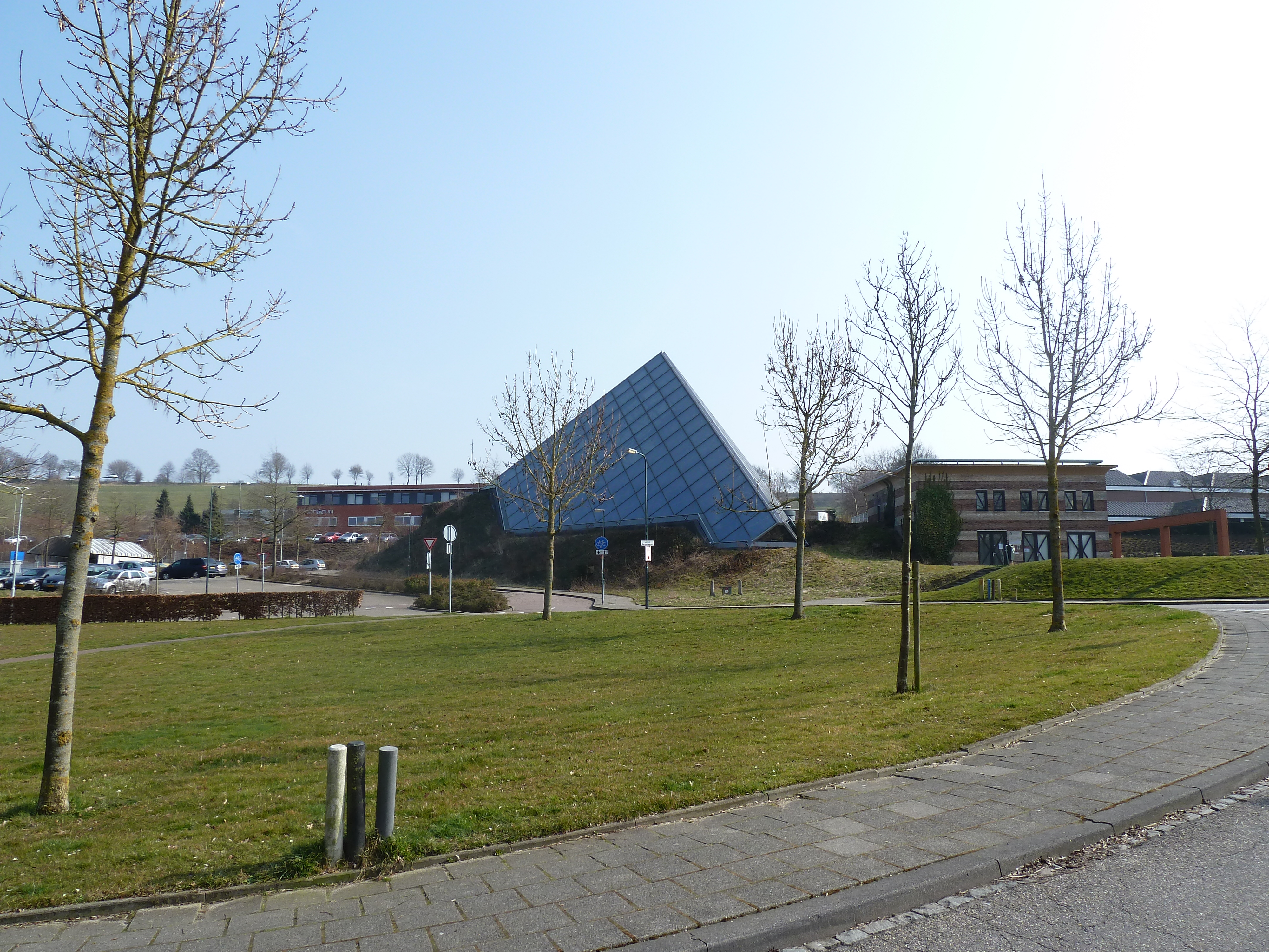 Piramide van Gulpen, Gulpen-Wittem, Limburg, Nederland